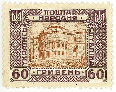 Марка УНР номіналом 60 гривень. Віденська серія.